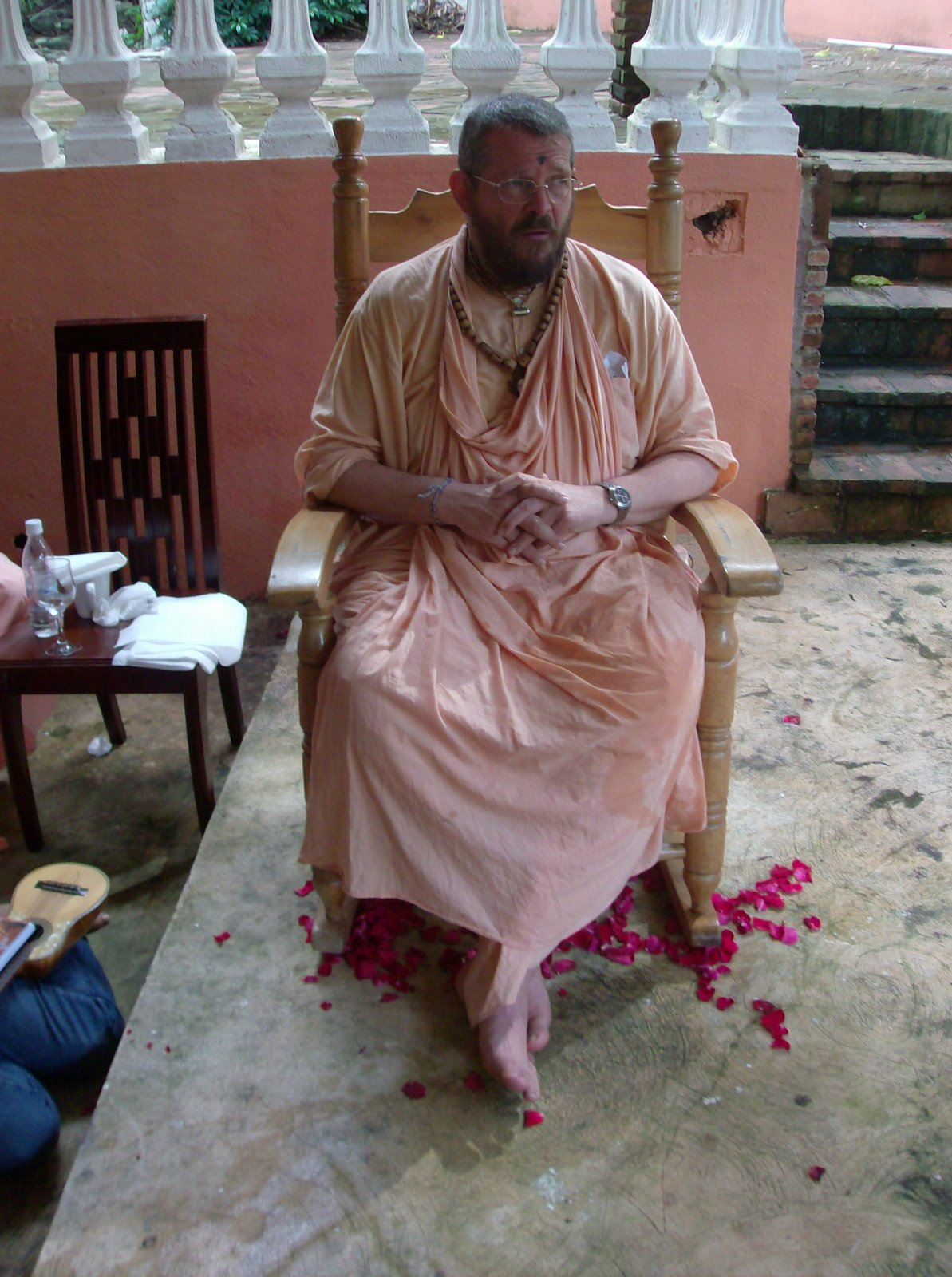 Fotografía tomada en el año 2007 en India